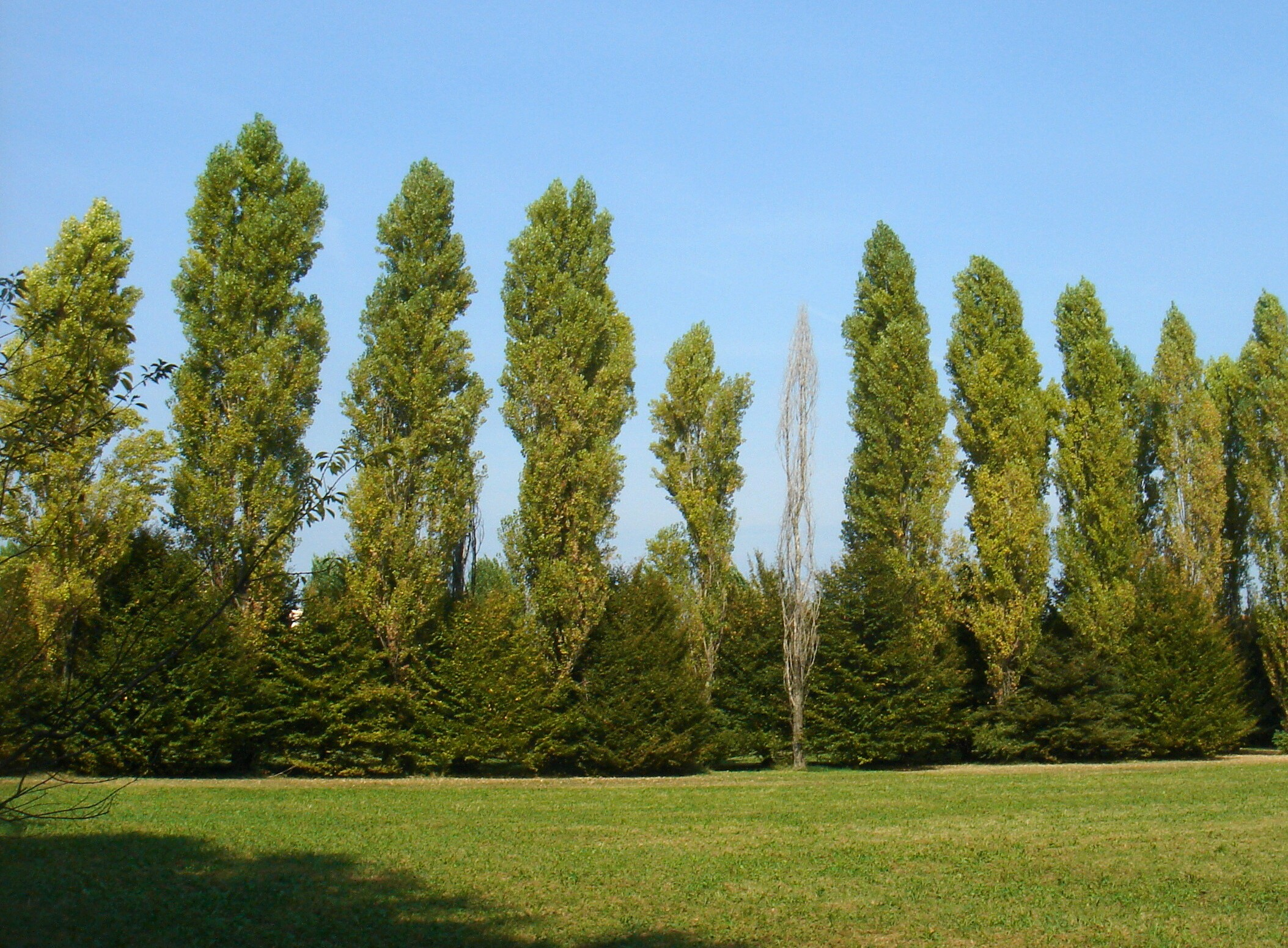 Parè di Conegliano (Treviso): particolare della parte superstite del parco di Villa Gera (XVIII secolo), inglobata nella zona industriale di Campidui; dietro gli alberi passa la SS13 Pontebbana.